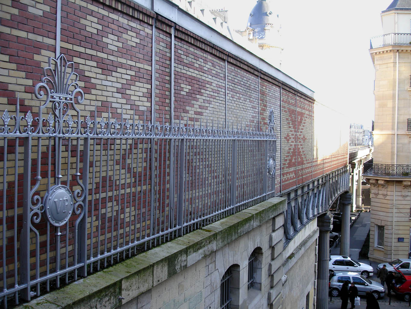 Métro de Paris (France) - ligne 6 - Station Passy